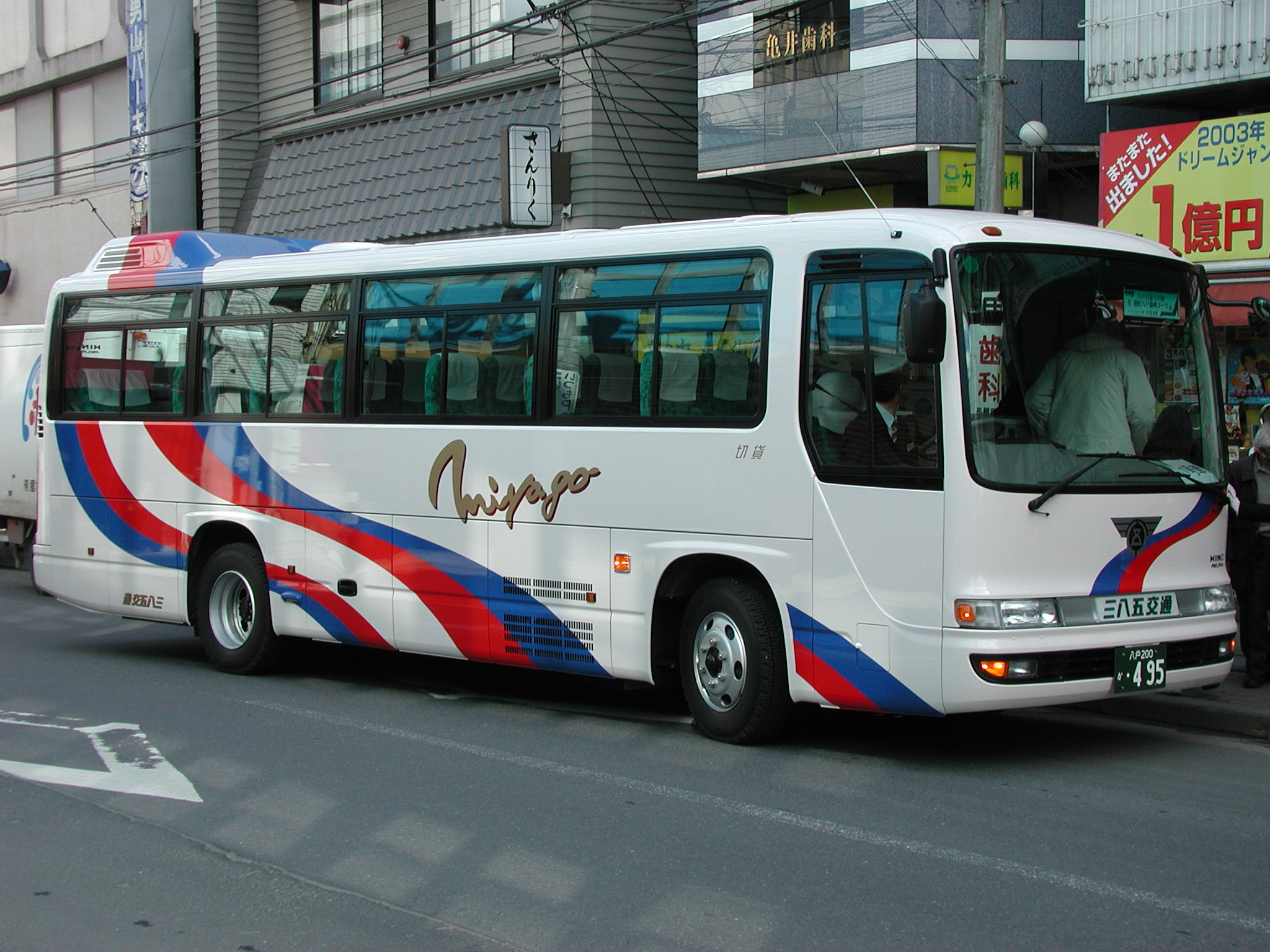 三八五交通：三八五グループバス事業新塗装 日野・メルファ（BDG-RR7JJBA） 六日町（八戸市）付近にて